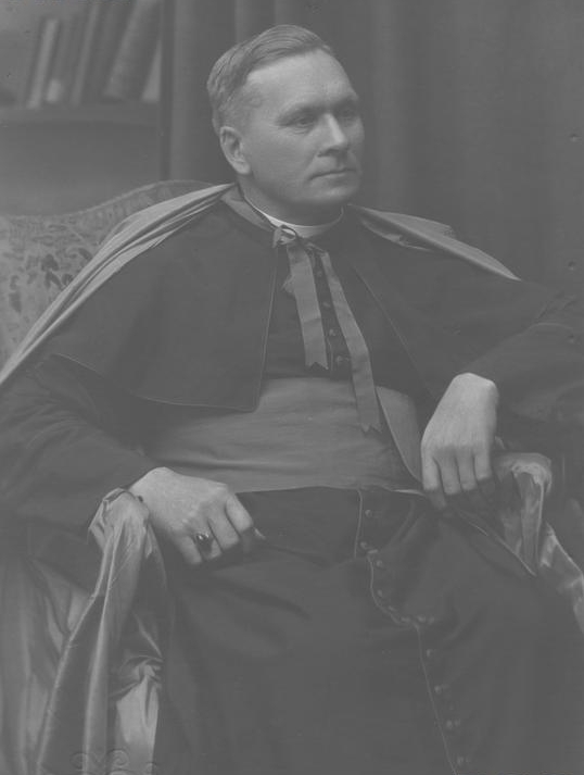 O. Bruno Wolnik - jezuita, biskup, prefekt apostolski w Rodezji, przełożony Polskiej Misji w Rodezji.